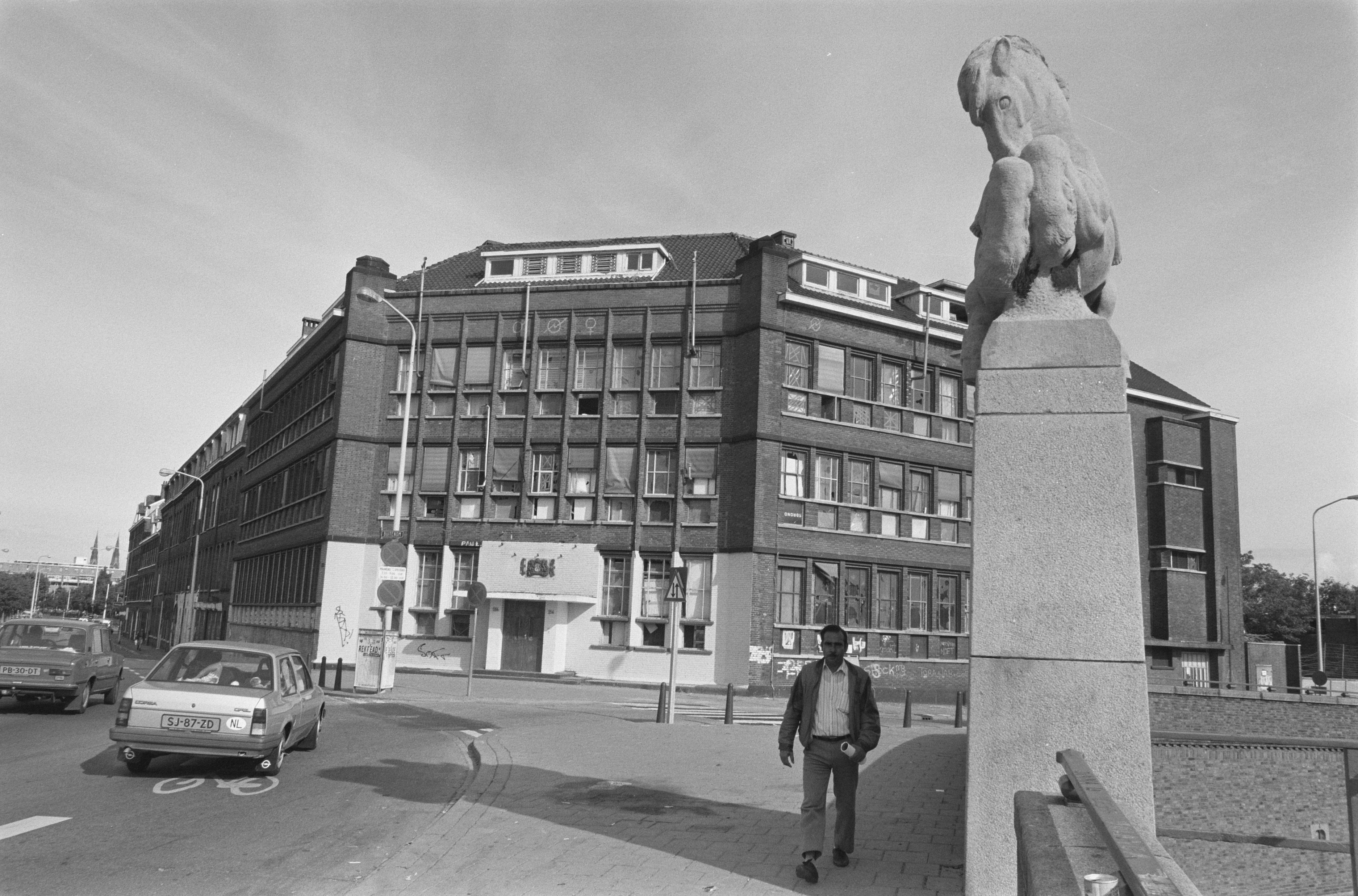 Collectie / Archief : Fotocollectie Anefo Reportage / Serie : [ onbekend ] Beschrijving : Exterieur kraakpand De Blauwe Aanslag in Den Haag Datum : 23 september 1987 Locatie : Den Haag, Zuid-Holland Trefwoorden : exterieur, kraakpanden Fotograaf : Croes, Rob C. / Anefo Auteursrechthebbende : Nationaal Archief Materiaalsoort : Negatief (zwart/wit) Nummer archiefinventaris : bekijk toegang 2.24.01.05 Bestanddeelnummer : 934-0839